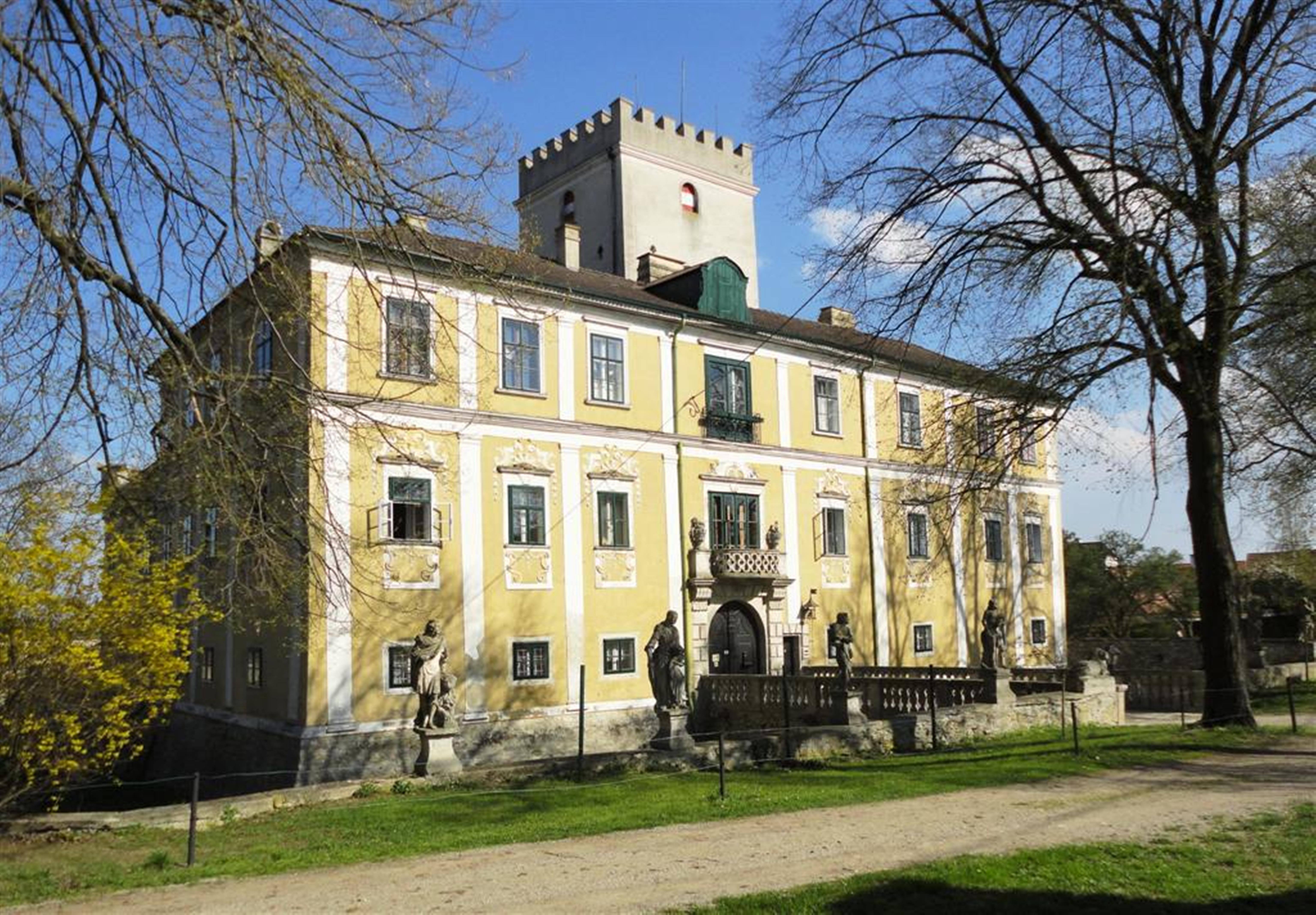 Berta v. Suttner Schloss Harmannsdorf